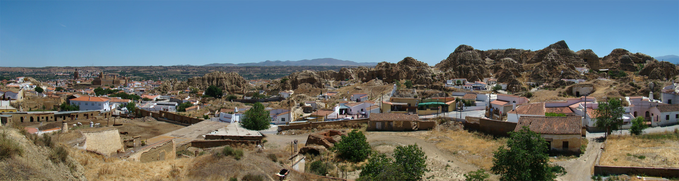 Las Cuevas, Guadix, Andalucía, España.